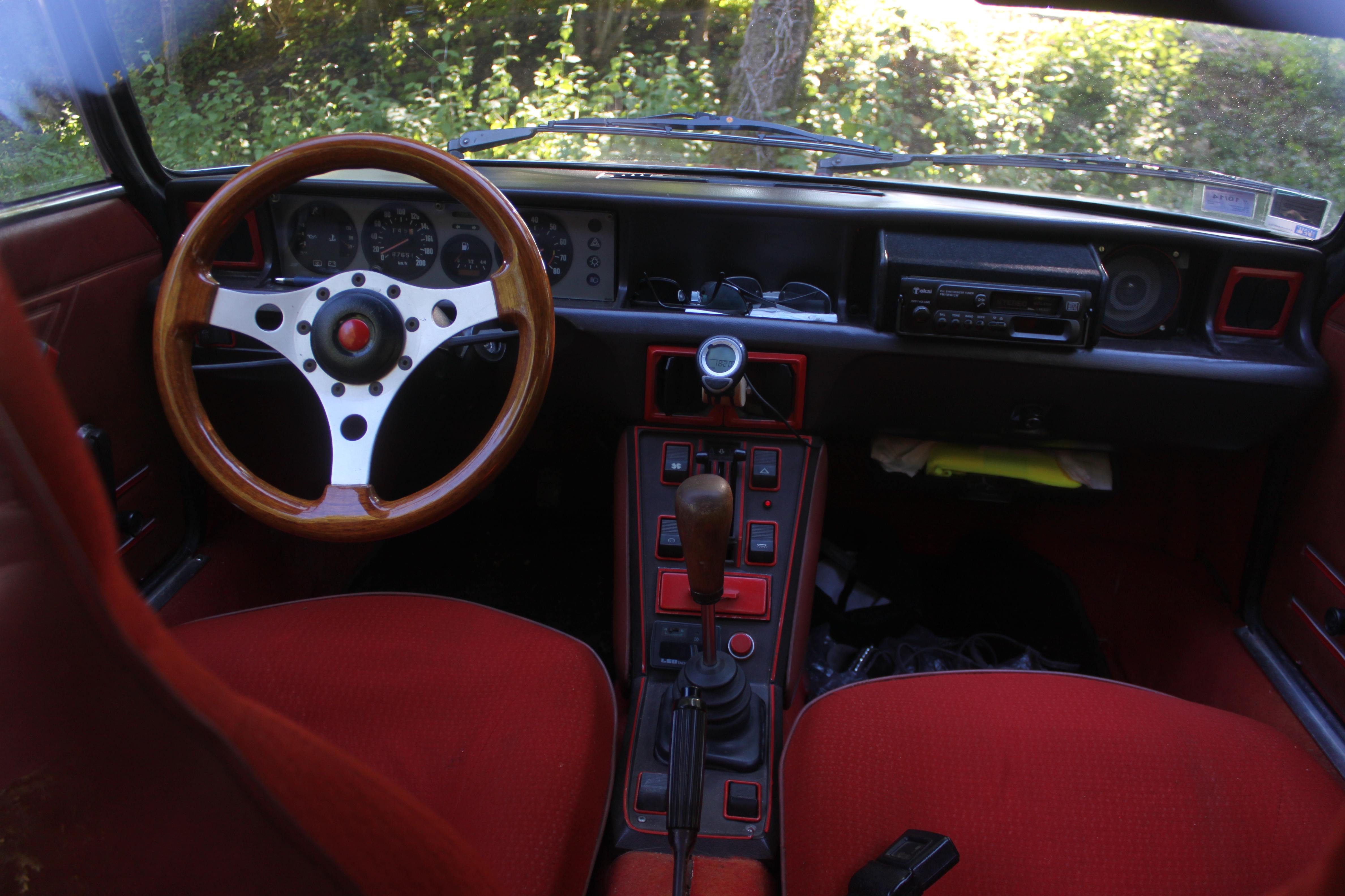 Intérieur de Fiat X1/9.